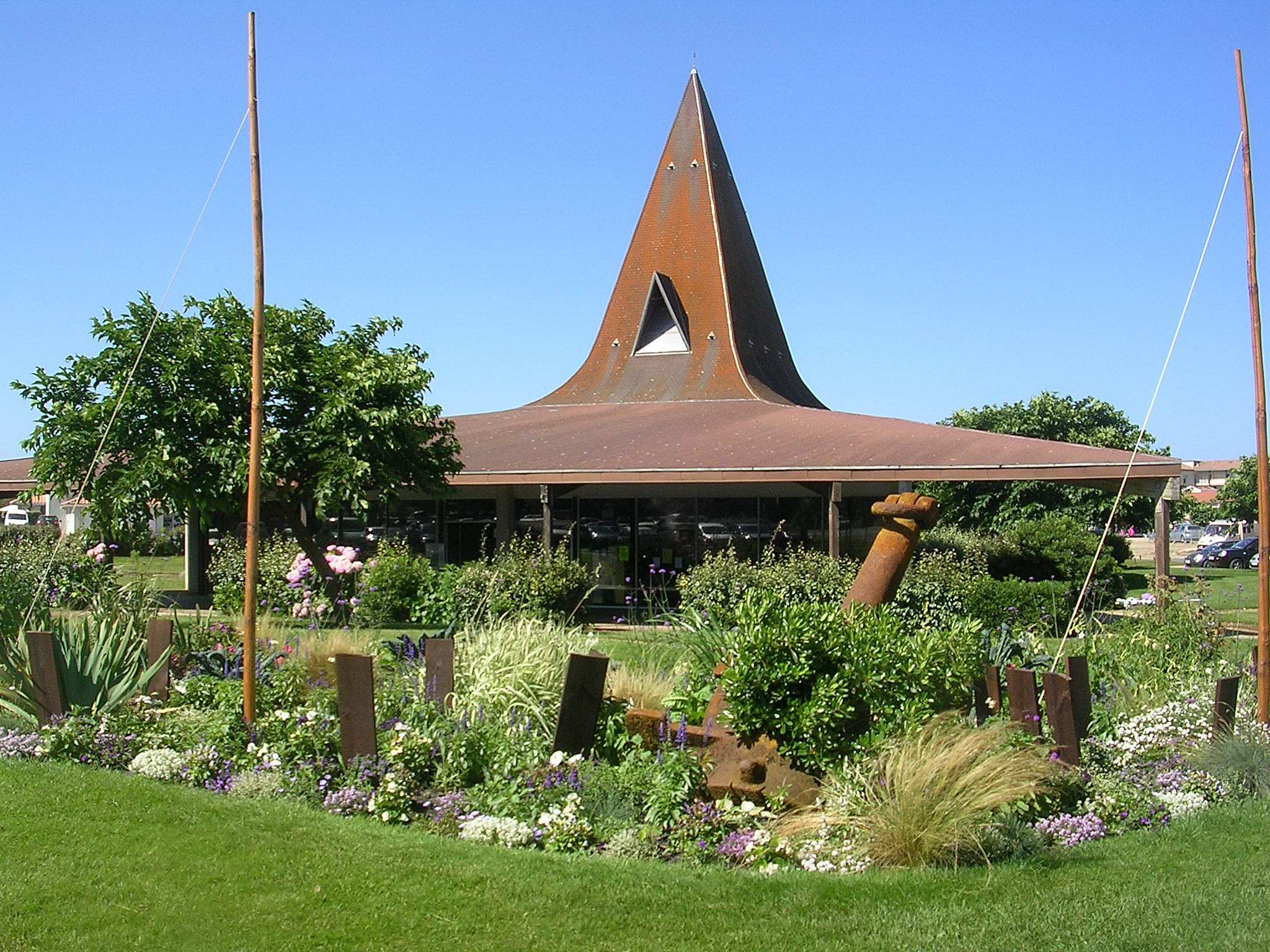 Église Notre-Dame des Dunes à Mimizan, dans le département français des Landes